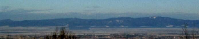 Persányi-hegység, Erdély